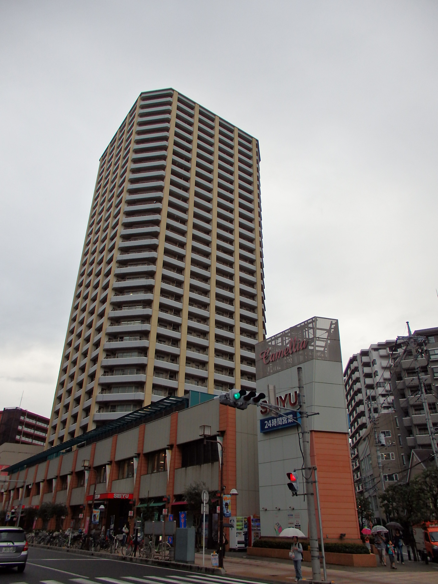 キャメリアタワー川口